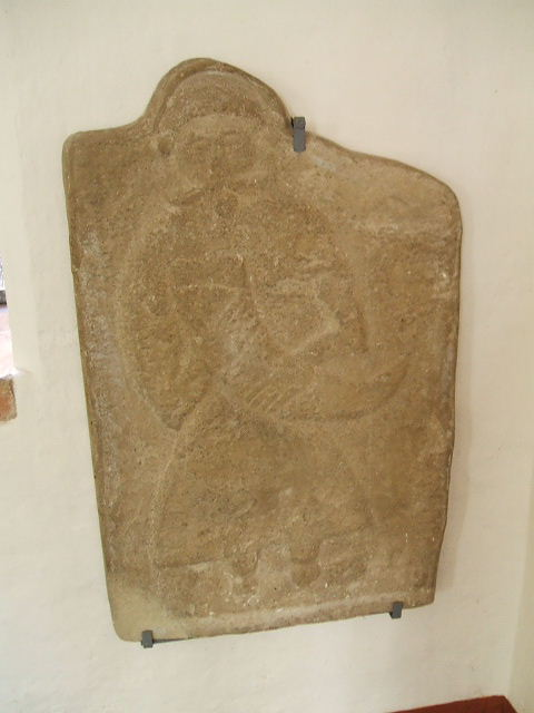 Svantevitstein Das Foto zeigt Exponate im Kulturhistorischen Mseum in Stralsund in Stralsund im März 2007.